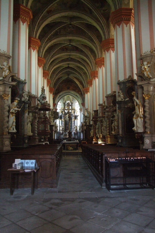 Stift Tepl - Hauptschiff der Klosterkirche